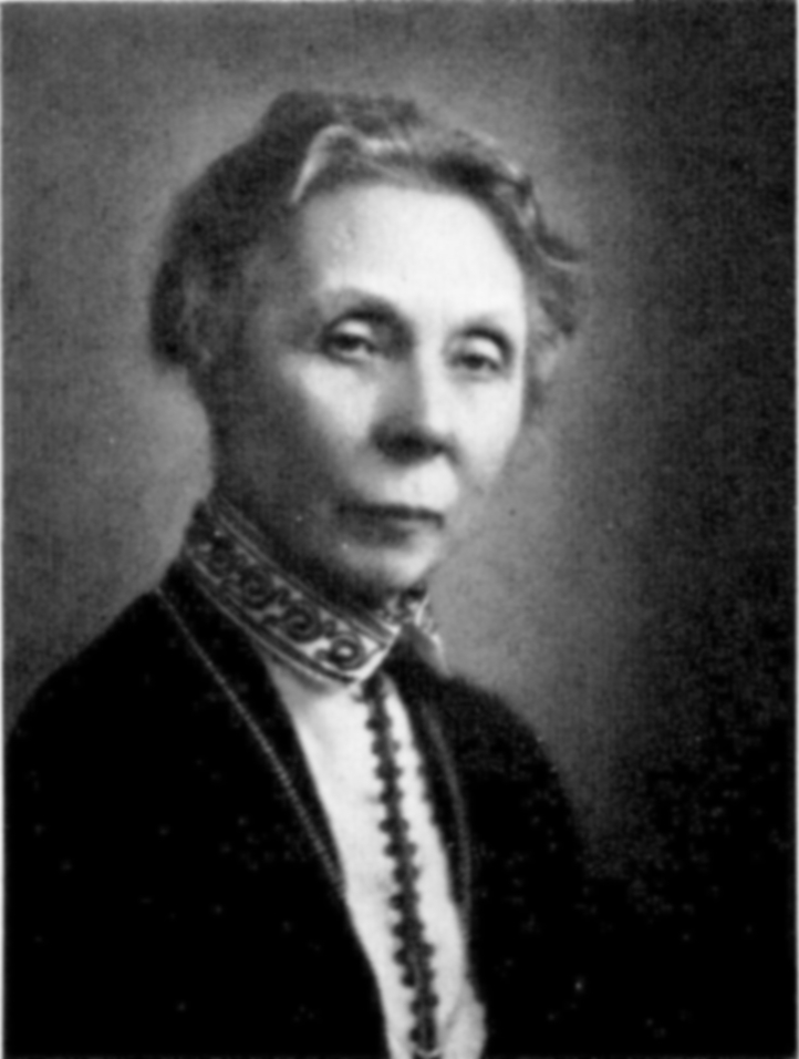 Sigrid Leijonhufvud, 1862-1937, svensk friherrinna, historiker och författare.